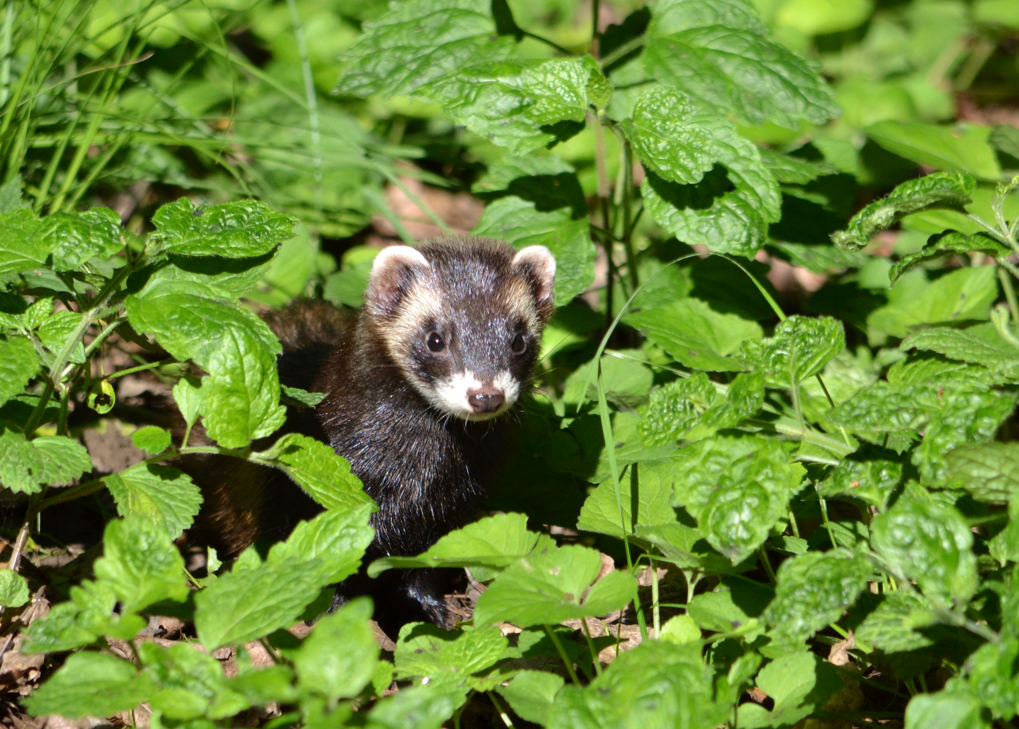 Adulter Iltis am Wiener Zentralfriedhof